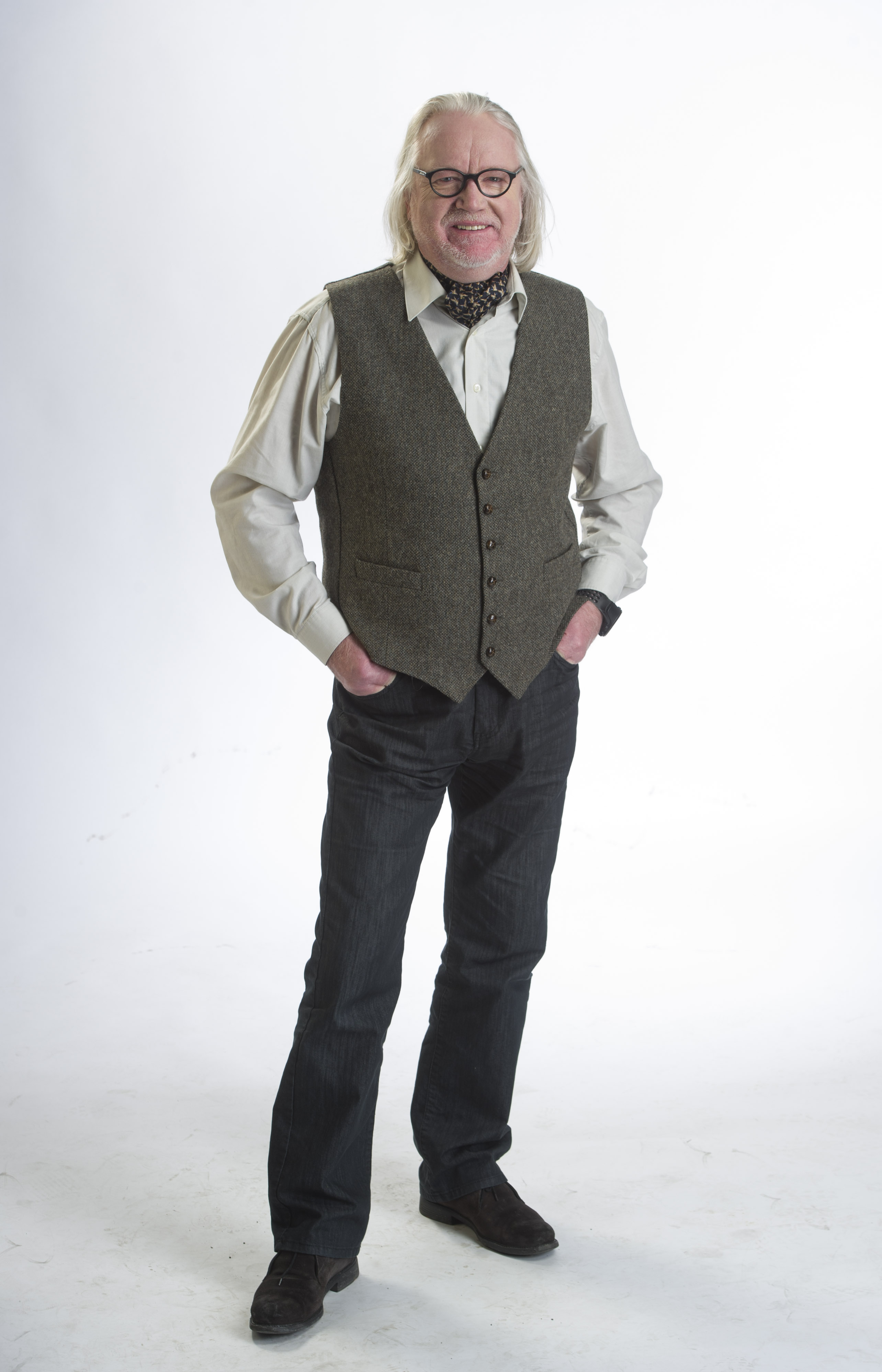 Indrek Rohtmets